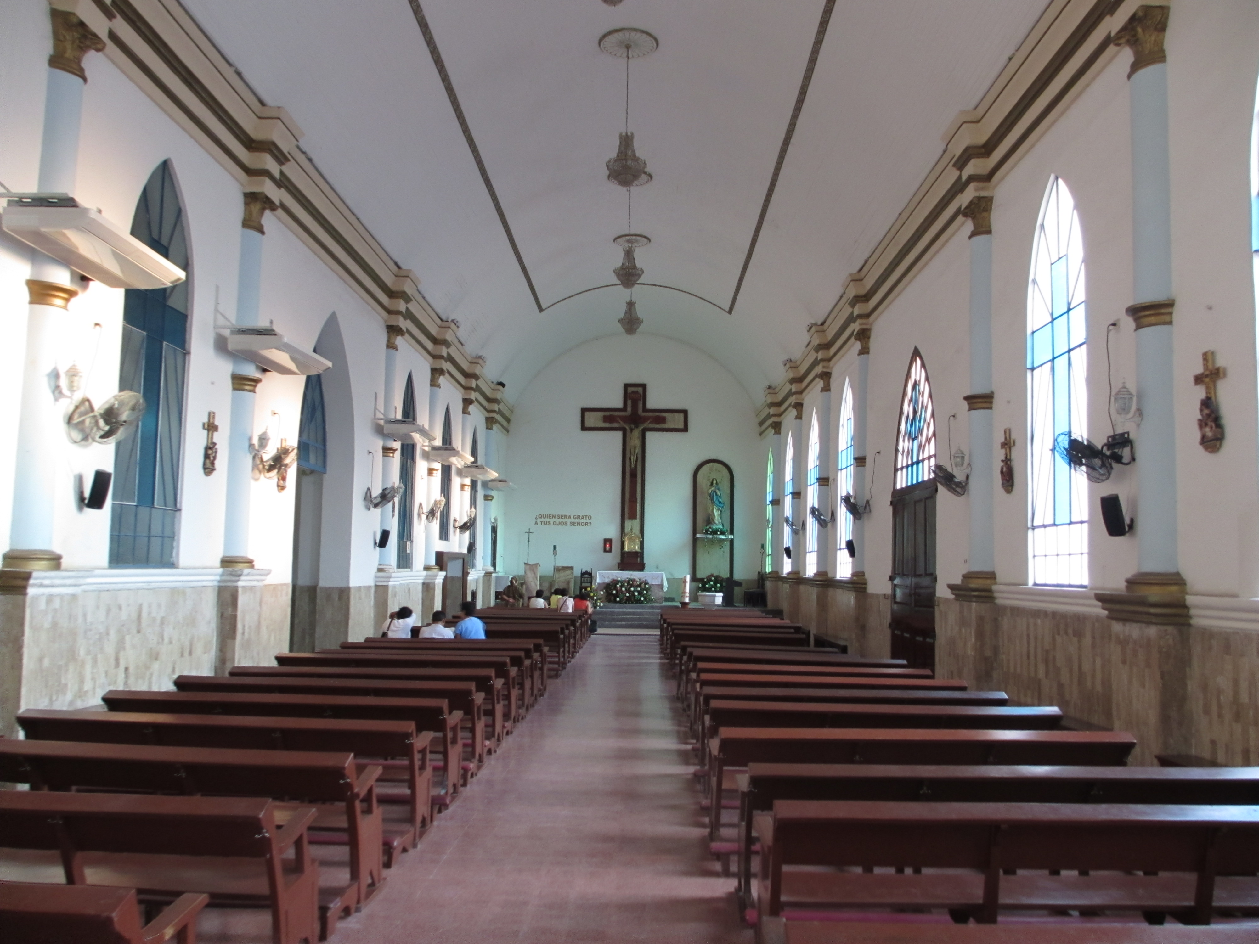 Interior del templo de la Inmaculada Concepción. Construido en 1800 en honor a la Virgen de la Inmaculada Concepción, la cual fue traída de España, el templo fue destruido por los bombardeos norteamericanos de 1847 y por los franceses de 1863-64, así como por ordenes del ex gobernador Tomás Garrido en 1830-35 durante la pesecución religiosa en el estado. Ciudad de Villahermosa, Tabasco, México.